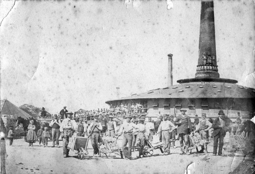 Hakkemose Teglværk, former brickyard in Taastrup, Denmark